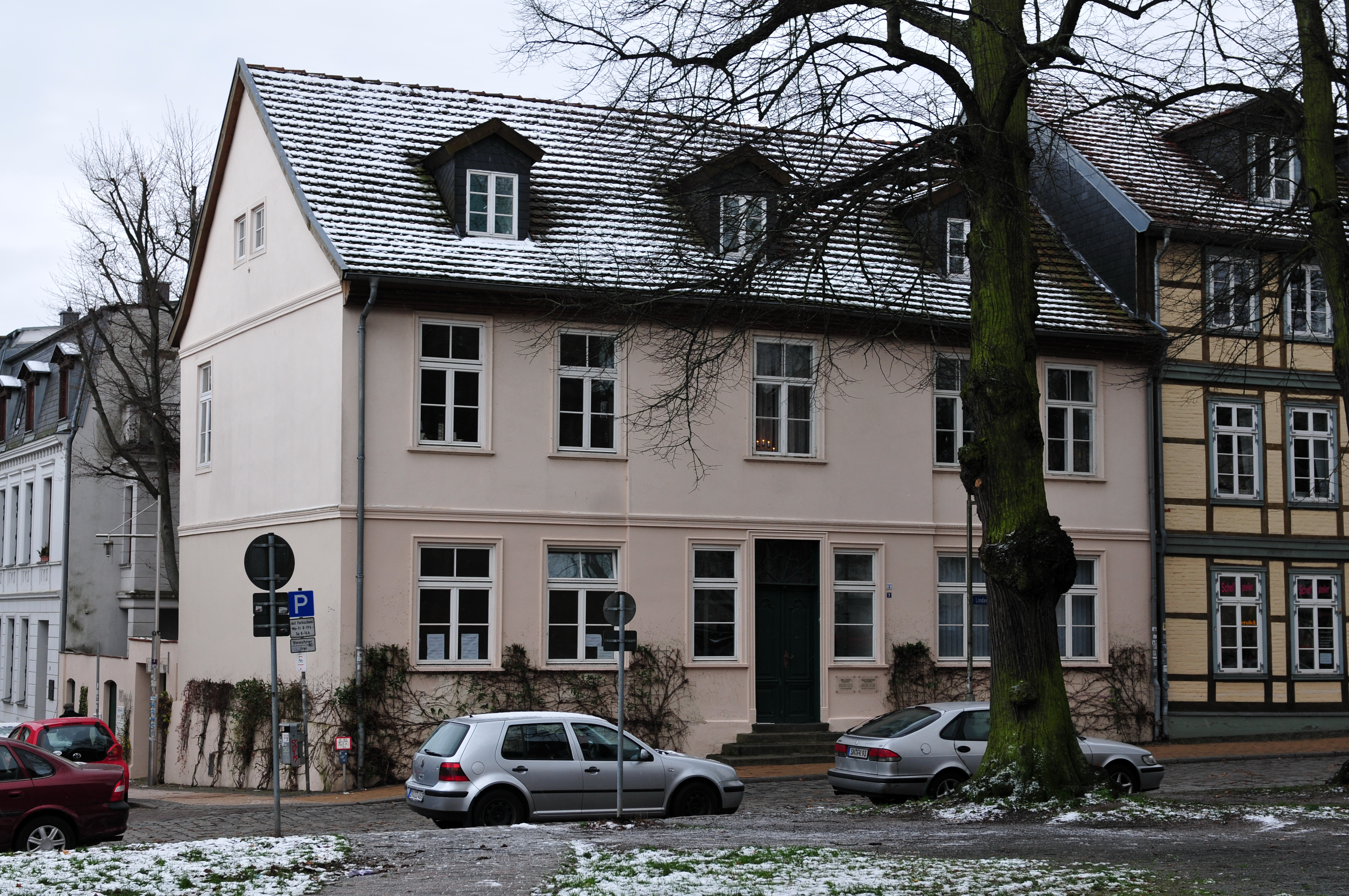 Das denkmalgeschützte Wohnhaus Lindenstraße 7 im Stadtteil Schelfstadt in Schwerin, Mecklenburg-Vorpommern.